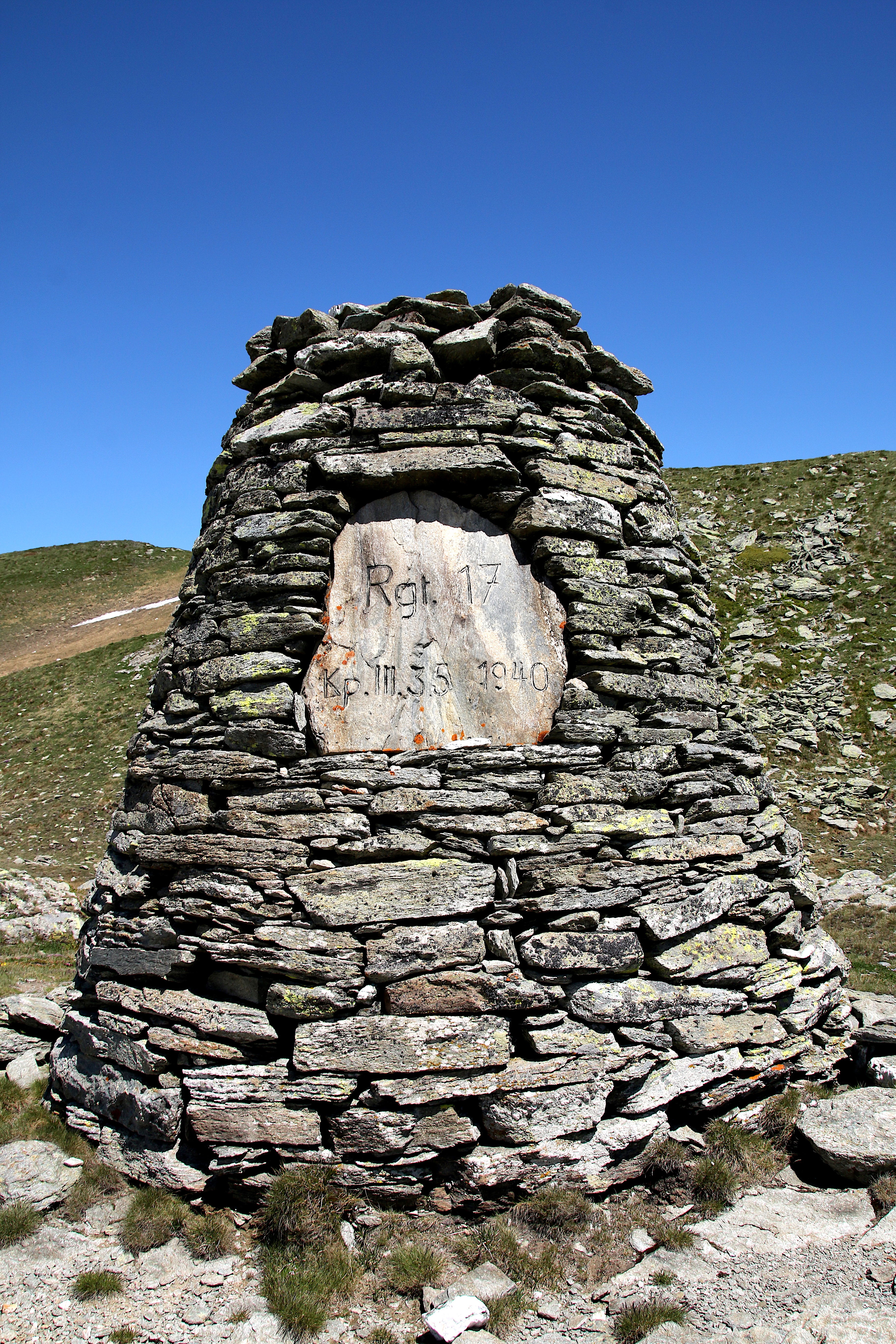 Ein von der dritten Kompanie des Füsilier-Bataillons 35 des Gebirgsinfanterieregimentes 17 auf dem Bistinepass 1940 errichtetes Monument.